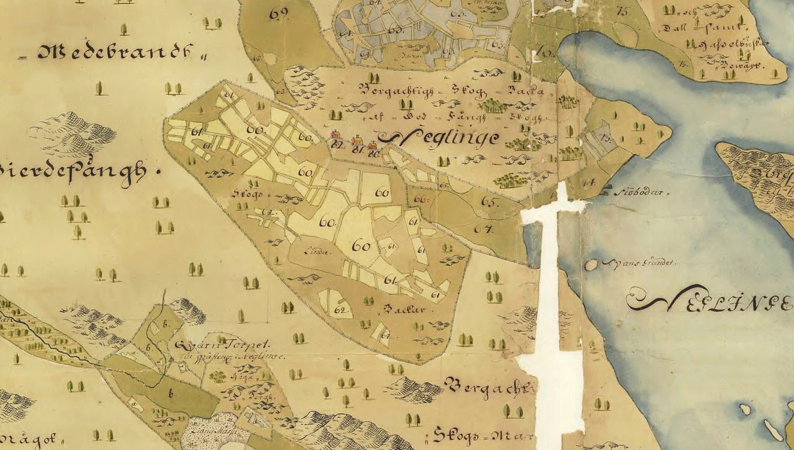 Del av Erstaviks ägor visande Neglinge, uppmätt och nedtecknad år 1721, 1722 och 1723